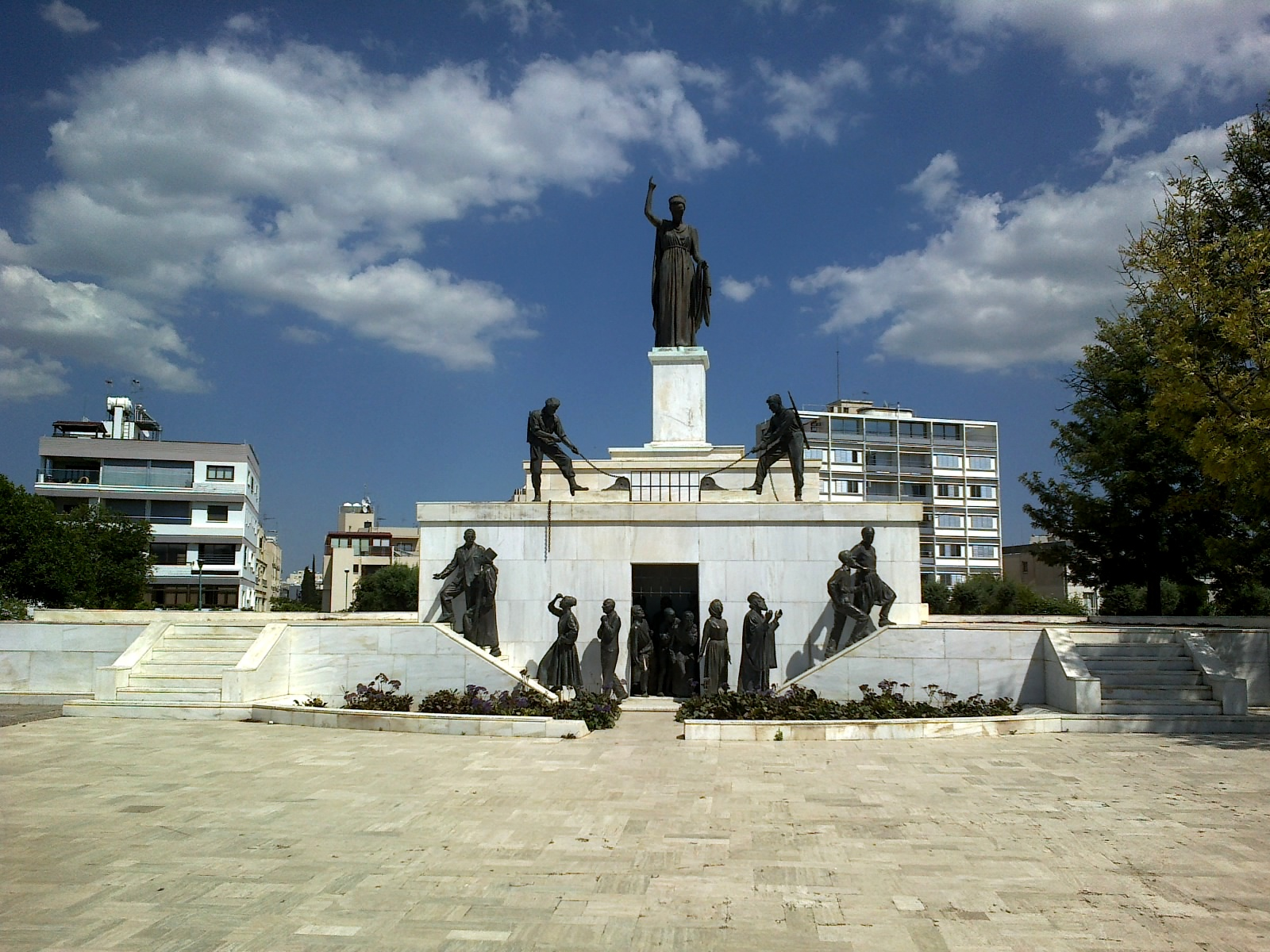 Chypre Nicosie Monument Liberte 14062014